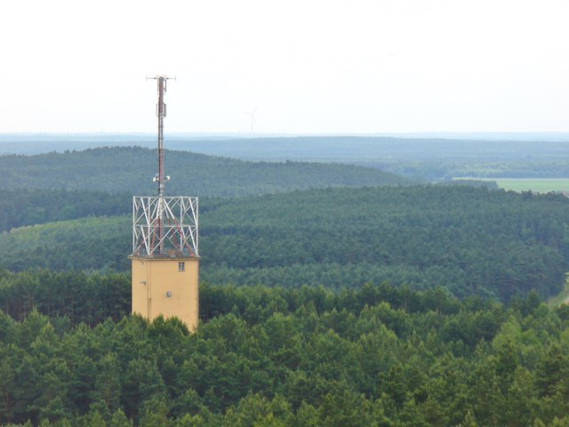 Hinterer Loewendorfer Berg - Sender (Transmission Tower)